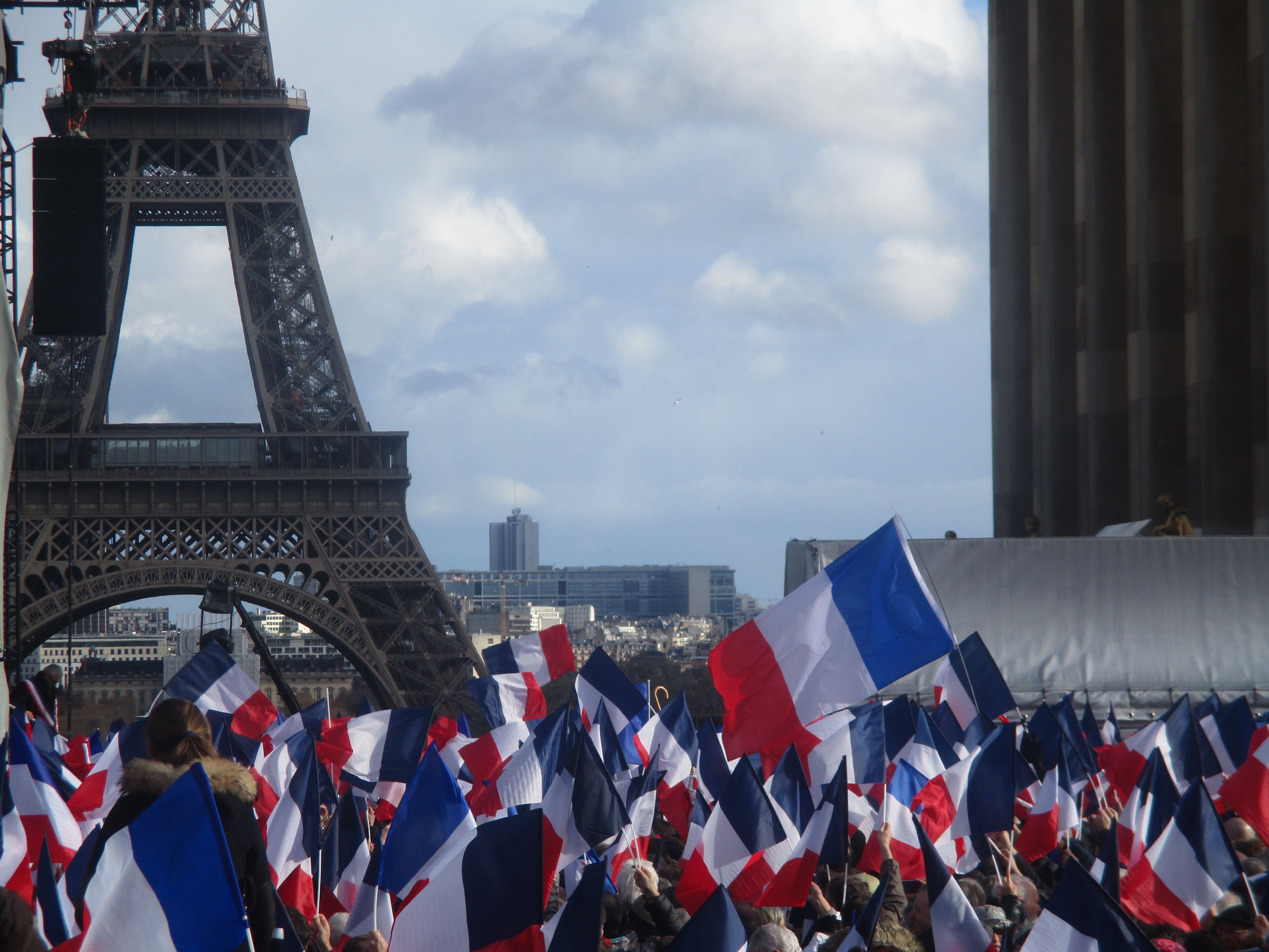 Manifestation de soutien à François Fillon, le dimanche 5 mars 2017, place du Trocadéro à Paris.